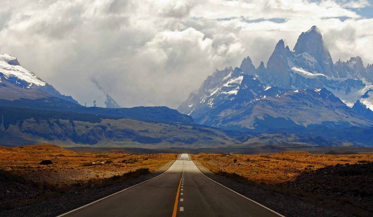 Road to El Chaltén, Santa Cruz, Argentina